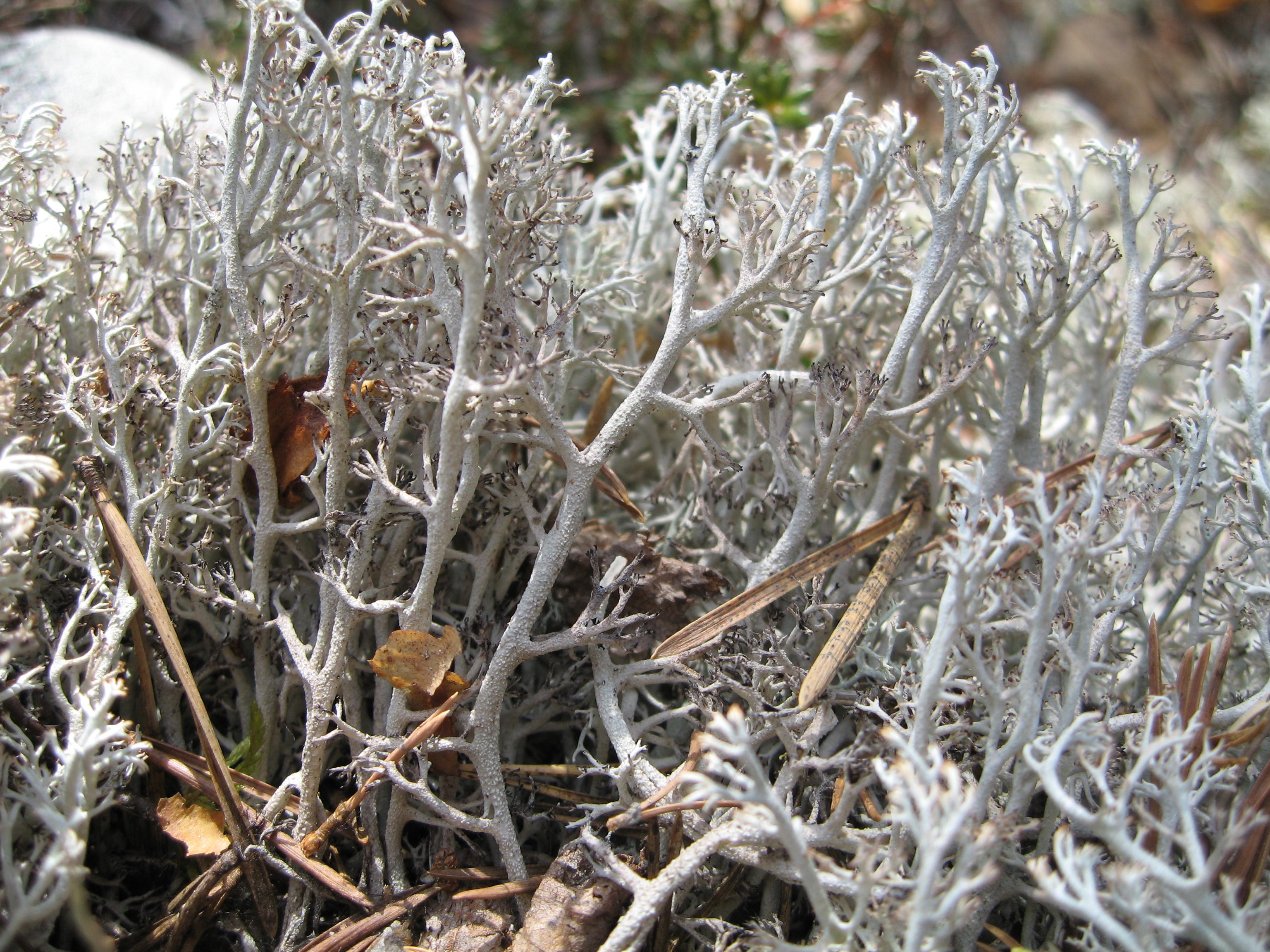 Grå reinlav - Cladonia rangiferina